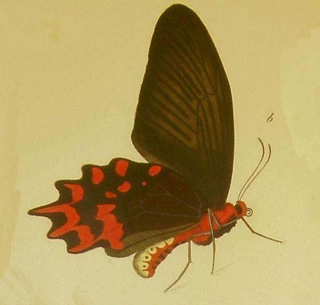 Papilio semperi female